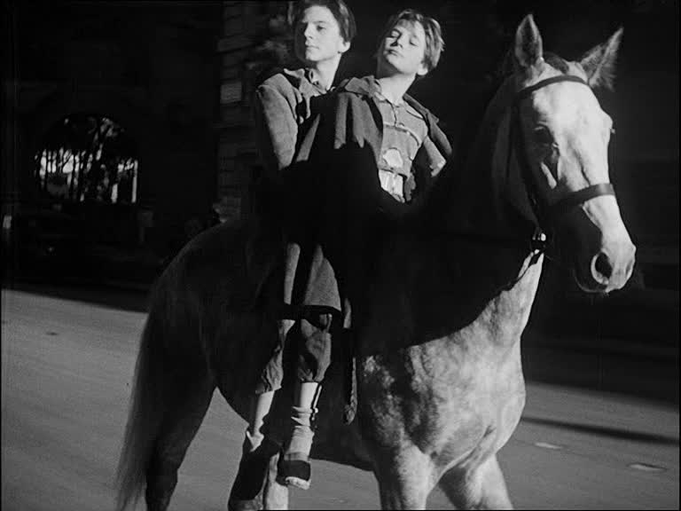 Screenshot del film Sciuscià (1946)